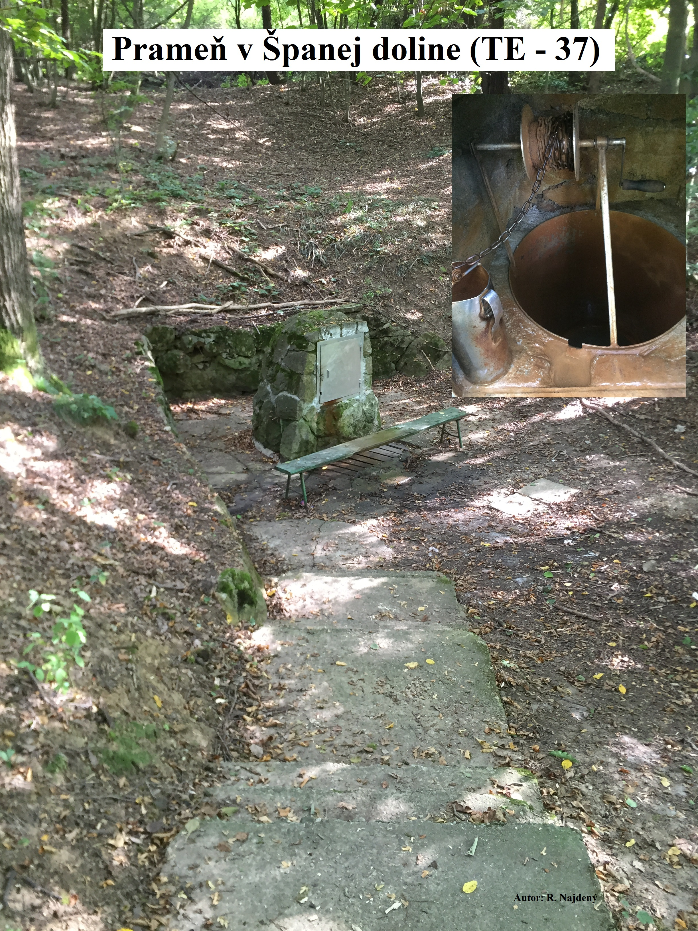 Prameň španie Nova bošáca